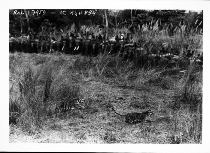 Deux tigres rabattus sur la ligne de chasse lors d’une chasse du roi Georges V à dos d’éléphants en Inde en 1912. 1 photographie nég. sur verre ; 13 x 18 cm (sup.)